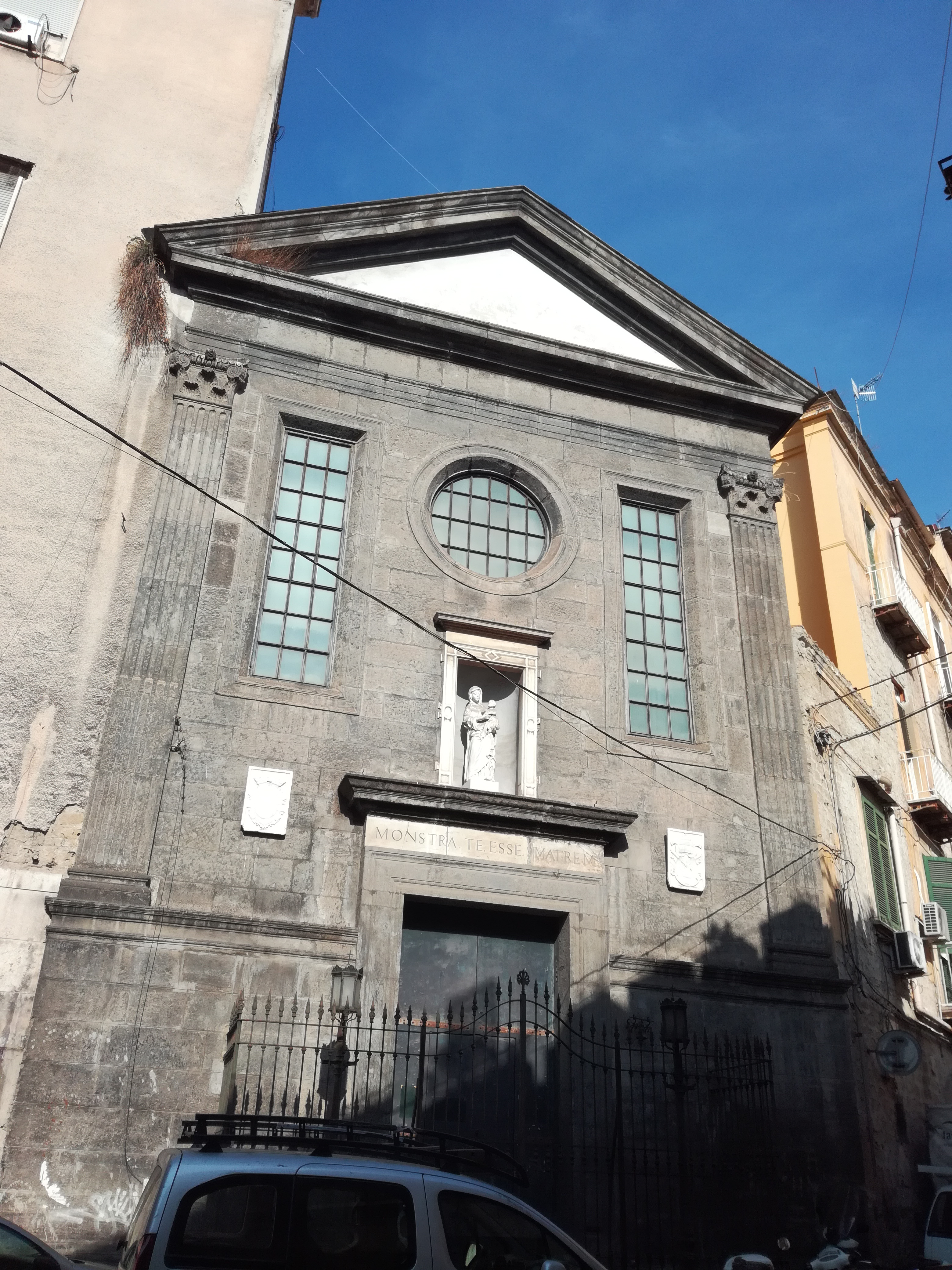 Facciata, Materdomini, Napoli